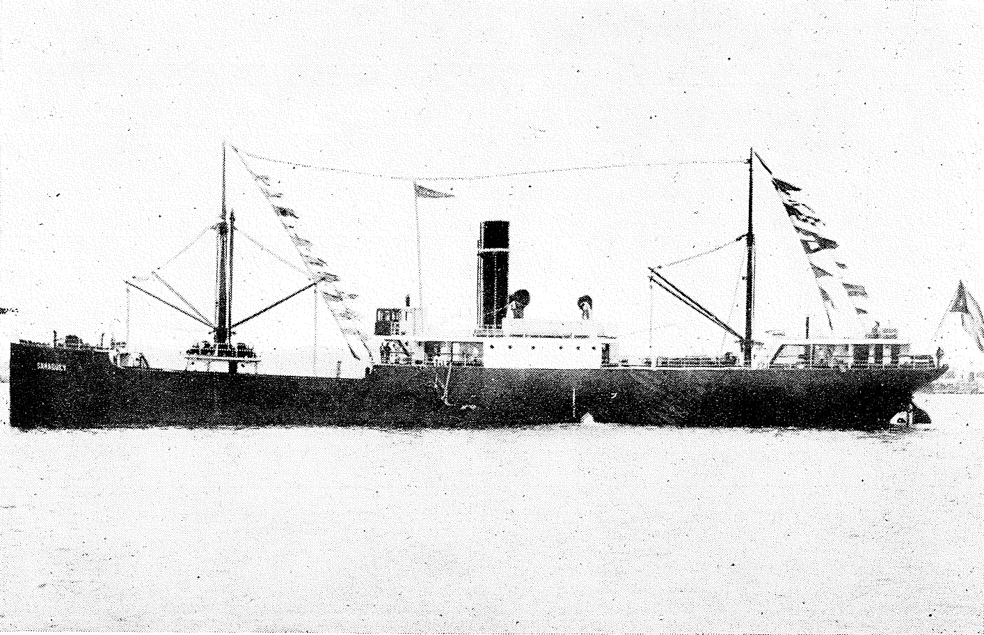 El Camagüey de 1399 tons. R.B. se construyo en Inglaterra en 1931. Fue el único barco construido expresamente por encargo de la Empresa Naviera de Cuba